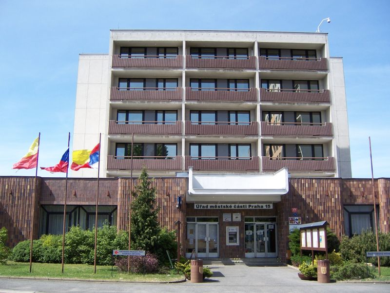 Praha-Horní Měcholupy, radnice Prahy 15 / Prague-Horní Měcholupy, city hall of Prague 15